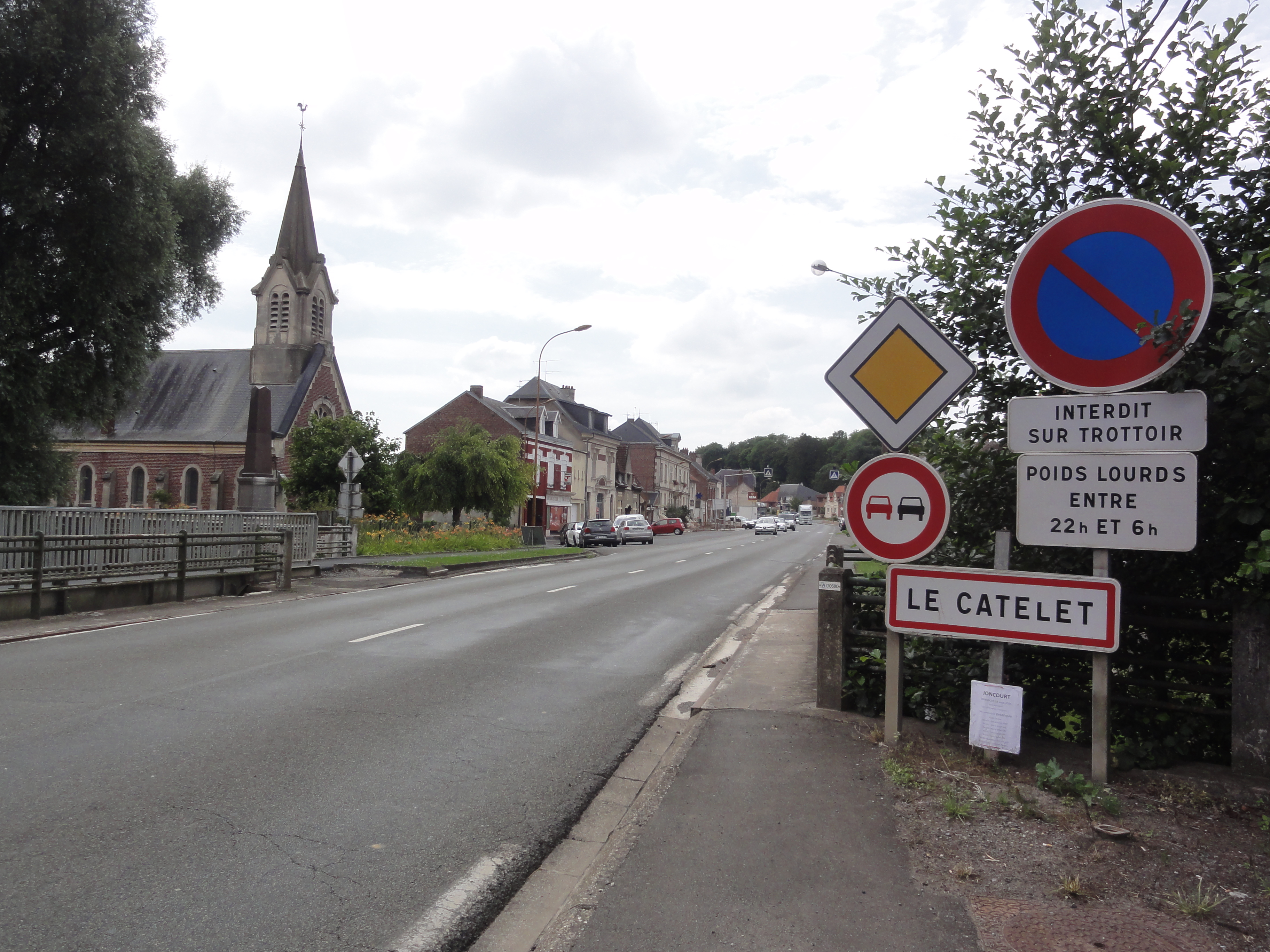 Le Catelet (Aisne) city limit sign